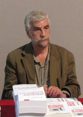 Christian Jacquiau au village du Livre de la fête de l'Humanité en septembre 2009.